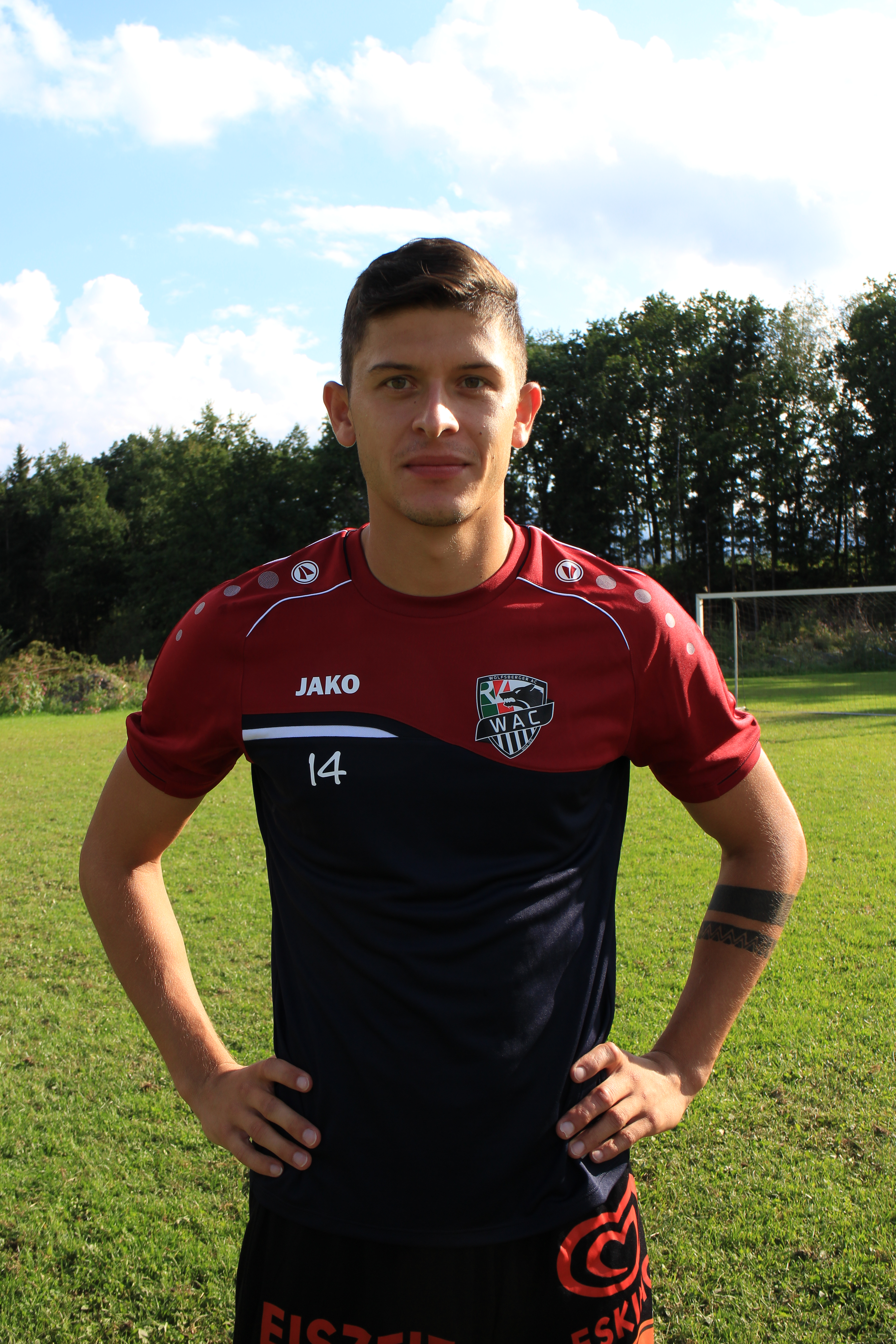 Stefan Gölles (WAC)